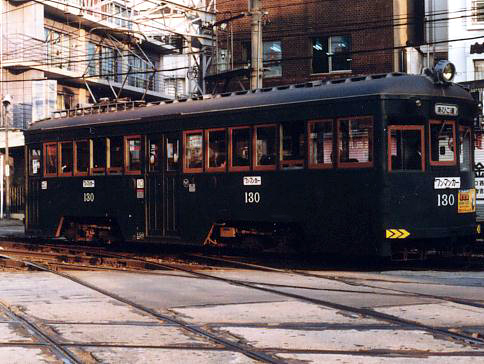 阪堺標準塗装のモ１３０号